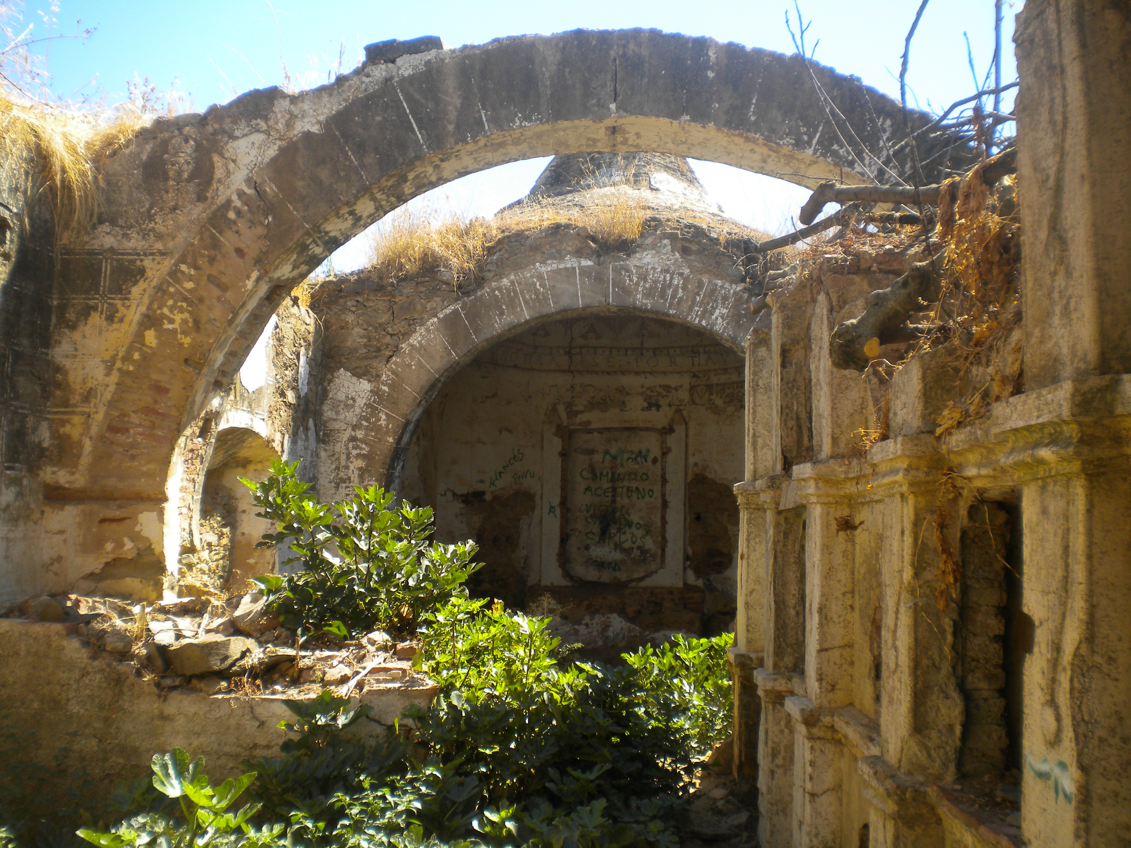 Interior de la ermita del Santo Cristo y antiguo cementerio de Talaván (Extremadura, España)